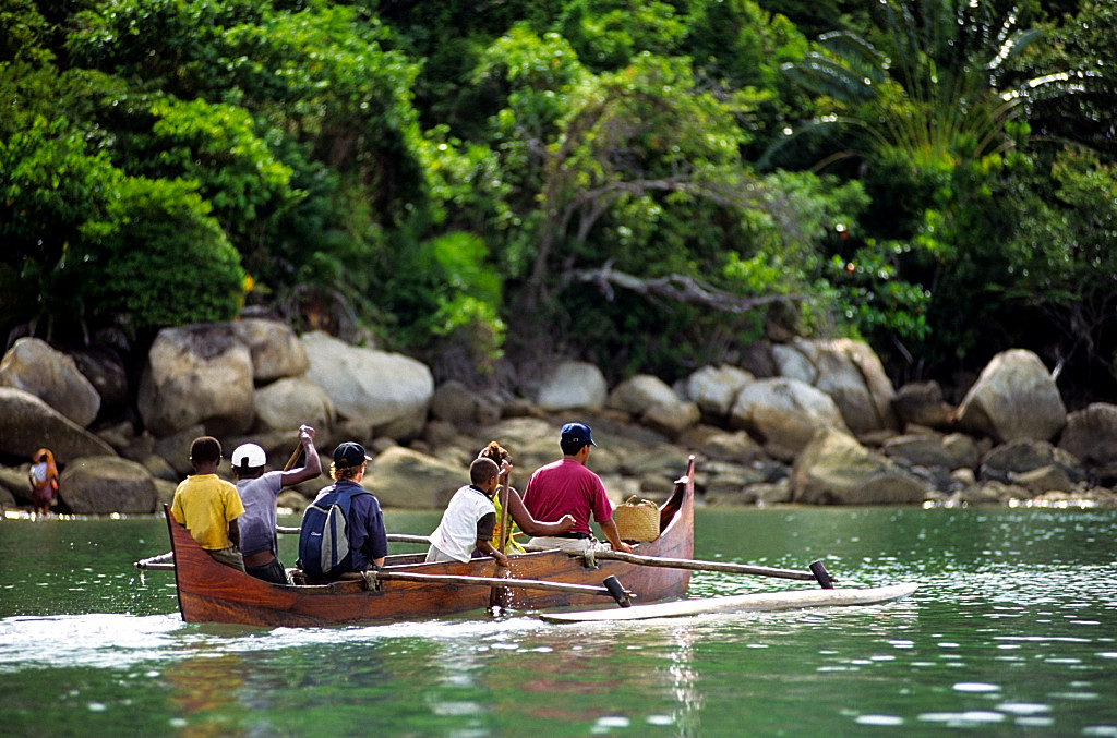 Réserve de Lokobé à Nosy Bé.